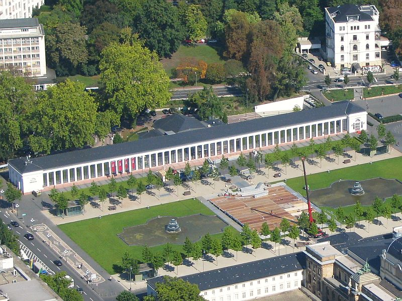 Wiesbaden Luftbild Kurhauskolonnaden I-Punkt Das kleine Spiel Spielbank Rotunde Bowling Green Foto 2008 Wolfgang Pehlemann Wiesbaden IMG_0193